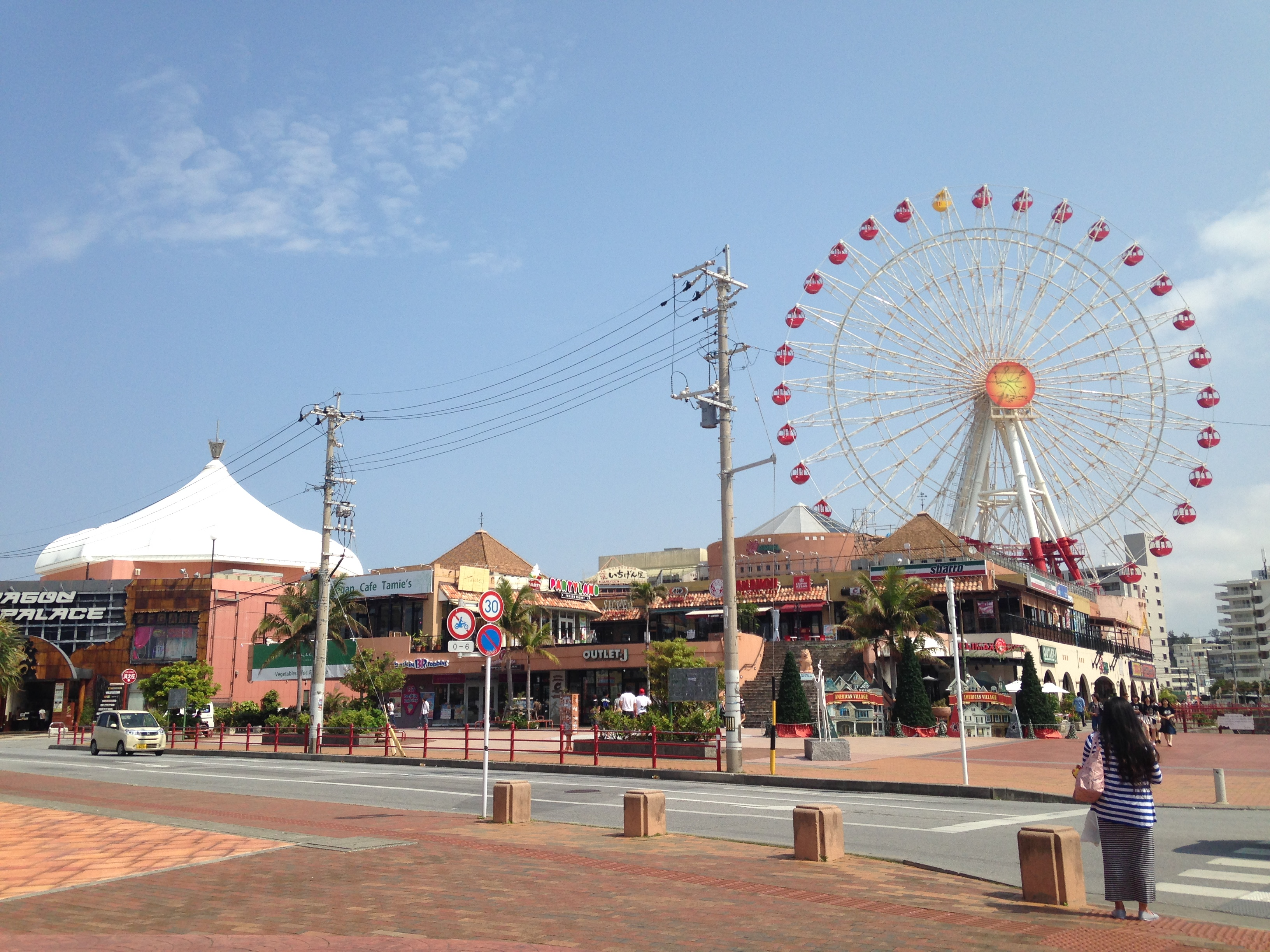 美浜タウンリゾート・アメリカンビレッジの観覧車